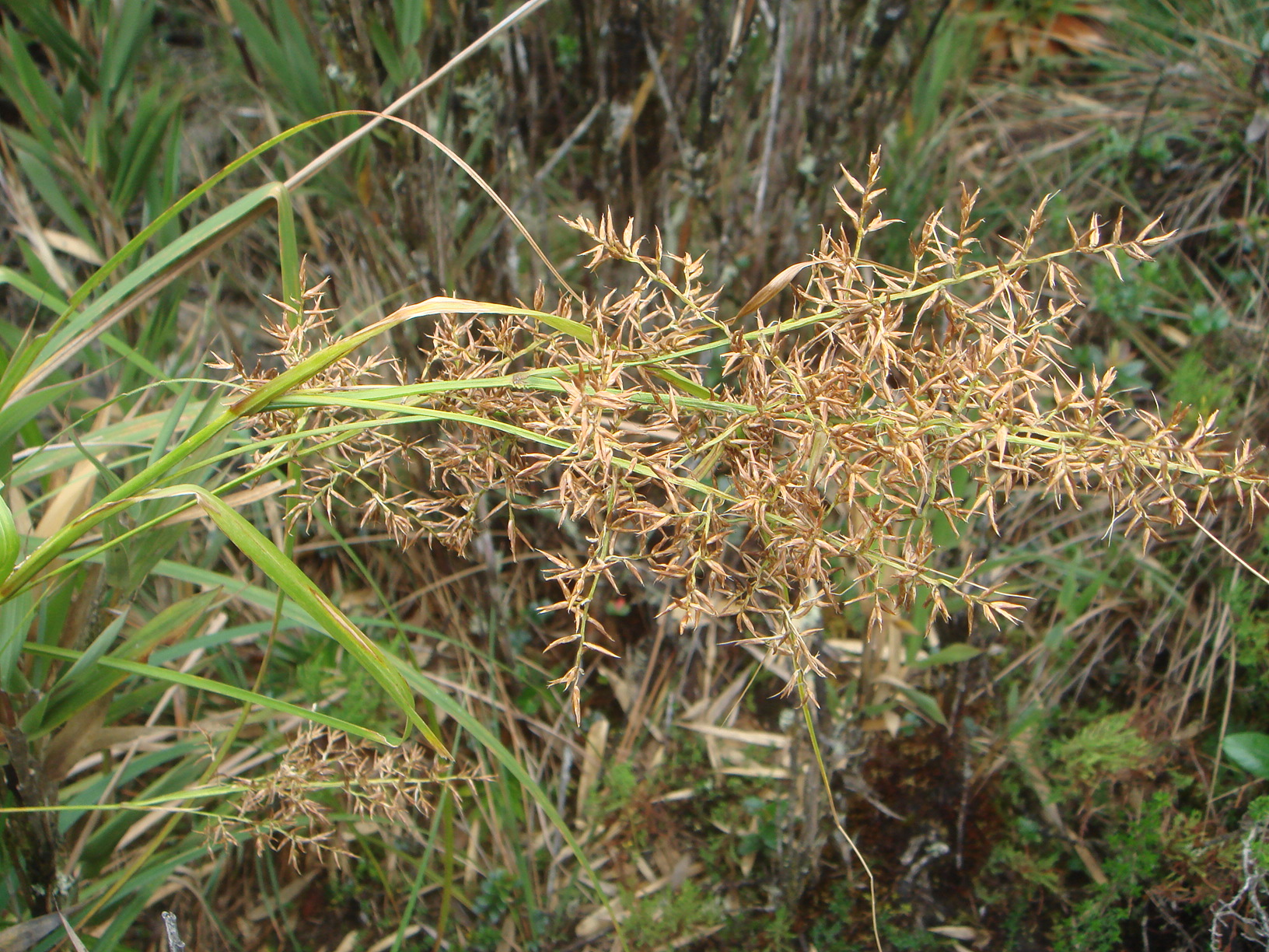 (Rhynchospora ruiziana), páramo de Guasca, Colombia